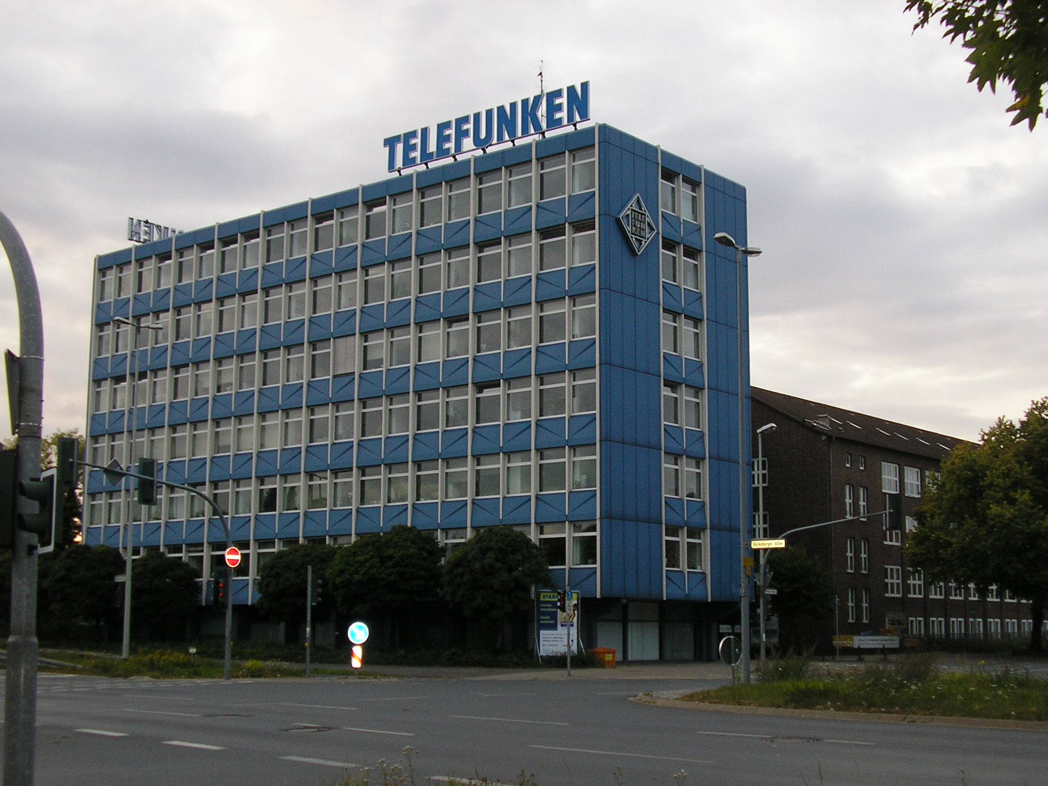 Verwaltungsgebäude der ehemaligen Telefunken Fernseh und Rundfunk GmbH, Göttinger Chaussee 76 in Hannover